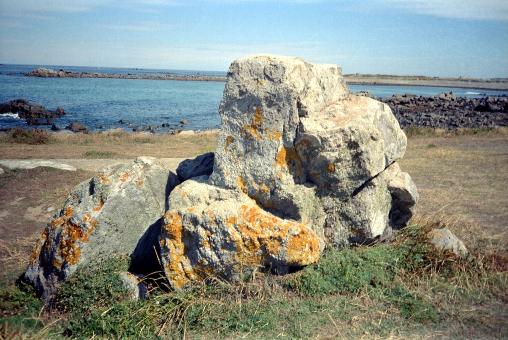 Guernsey landscape